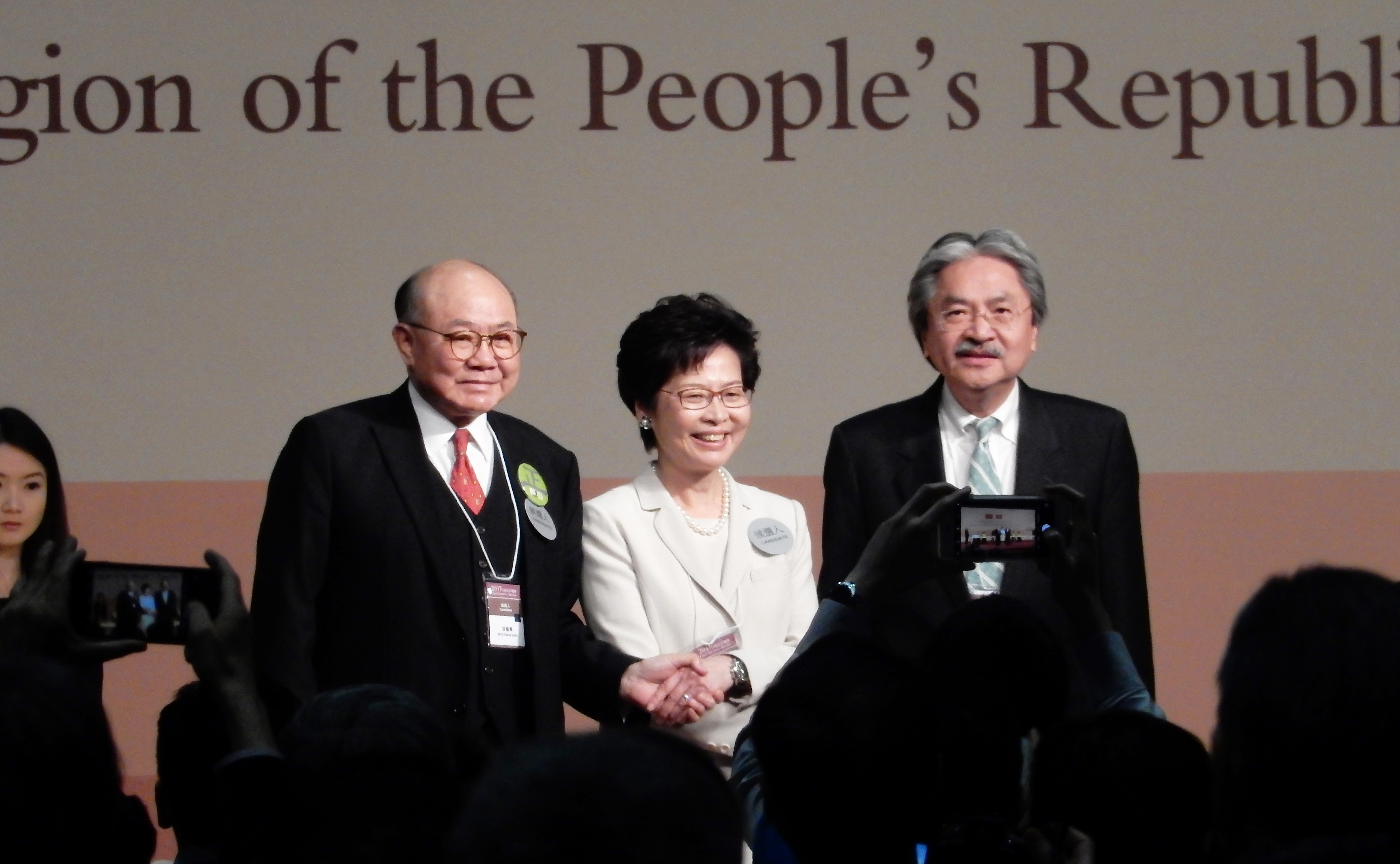 中文（香港）: 3名香港特首選舉候選人胡國興(左起)、林鄭月娥及曾俊華。(美國之音湯惠芸)